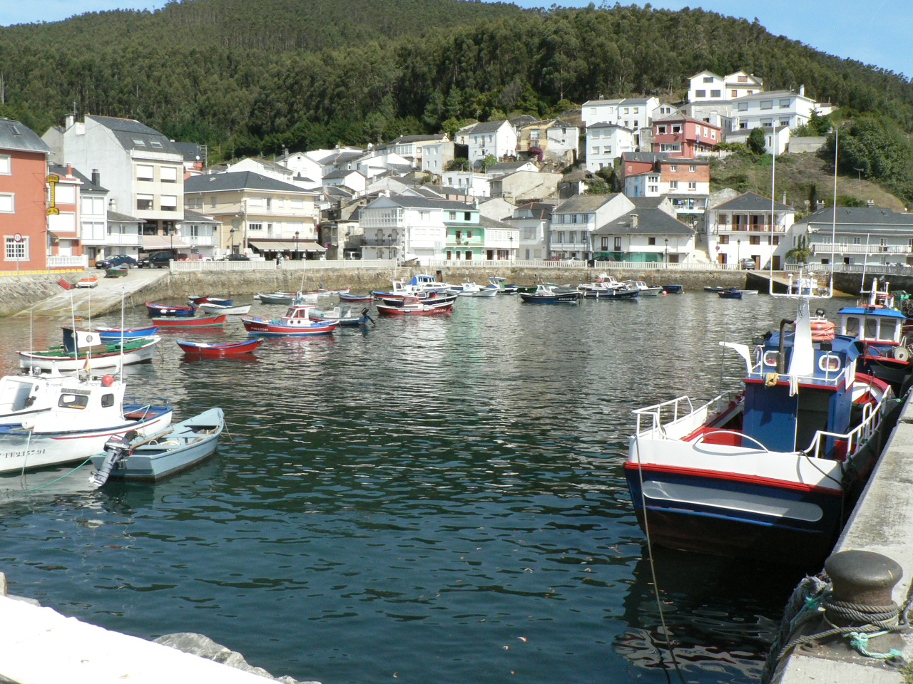 Porto do Barqueiro Licensing Categoría:Imaxes de Mogor Categoría:Imaxes da semana Categoría:Imaxes de embarcacións en Galicia